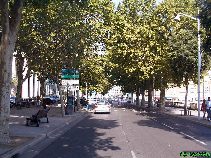 Place Ile de Beauté, vers l'ouest et la rue Cassini.